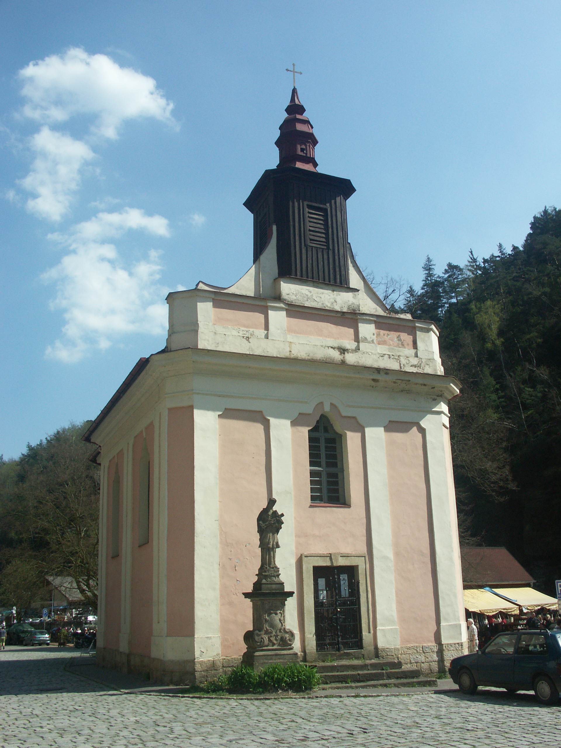 kleine Kirche in Hřensko